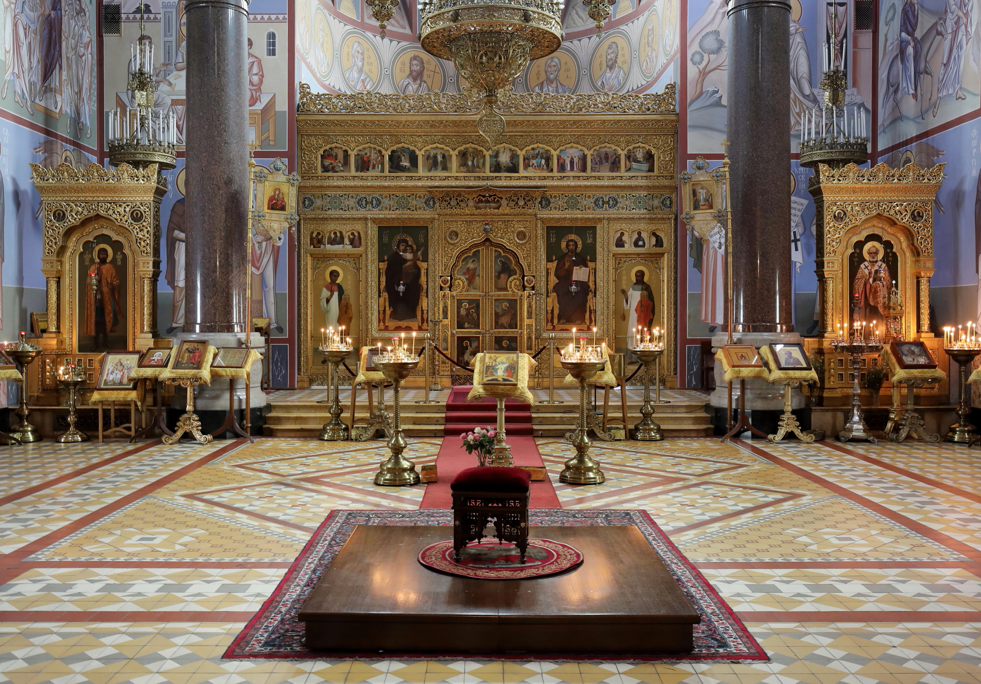 Innenansicht der russisch-orthodoxe Kathedrale hl. Nikolaus an der Adresse Jaurèsgasse 2 im 3. Wiener Gemeindebezirk Landstraße.Die Kathedrale wurde von 1893 bis 1899 als zweigeschossiger freistehender späthistoristischer Backsteinbau in russisch-spätbyzantinischem Stil nach Plänen des St. Petersburger Architekten Grigorij Iwanowitsch Kotov vom italienischen Architekten Luigi Ritter von Giacomelli als Botschaftskirche errichtet. Der Raumeindruck wird beherrscht von der Ikonostase, die die Apsis vom übrigen Kirchenraum trennt. Sie ist nach einem Entwurf von Kotov ausgeführt, reich geschnitzt und vergoldet und mit auf Kupfer gemalten Ikonen ausgestattet.